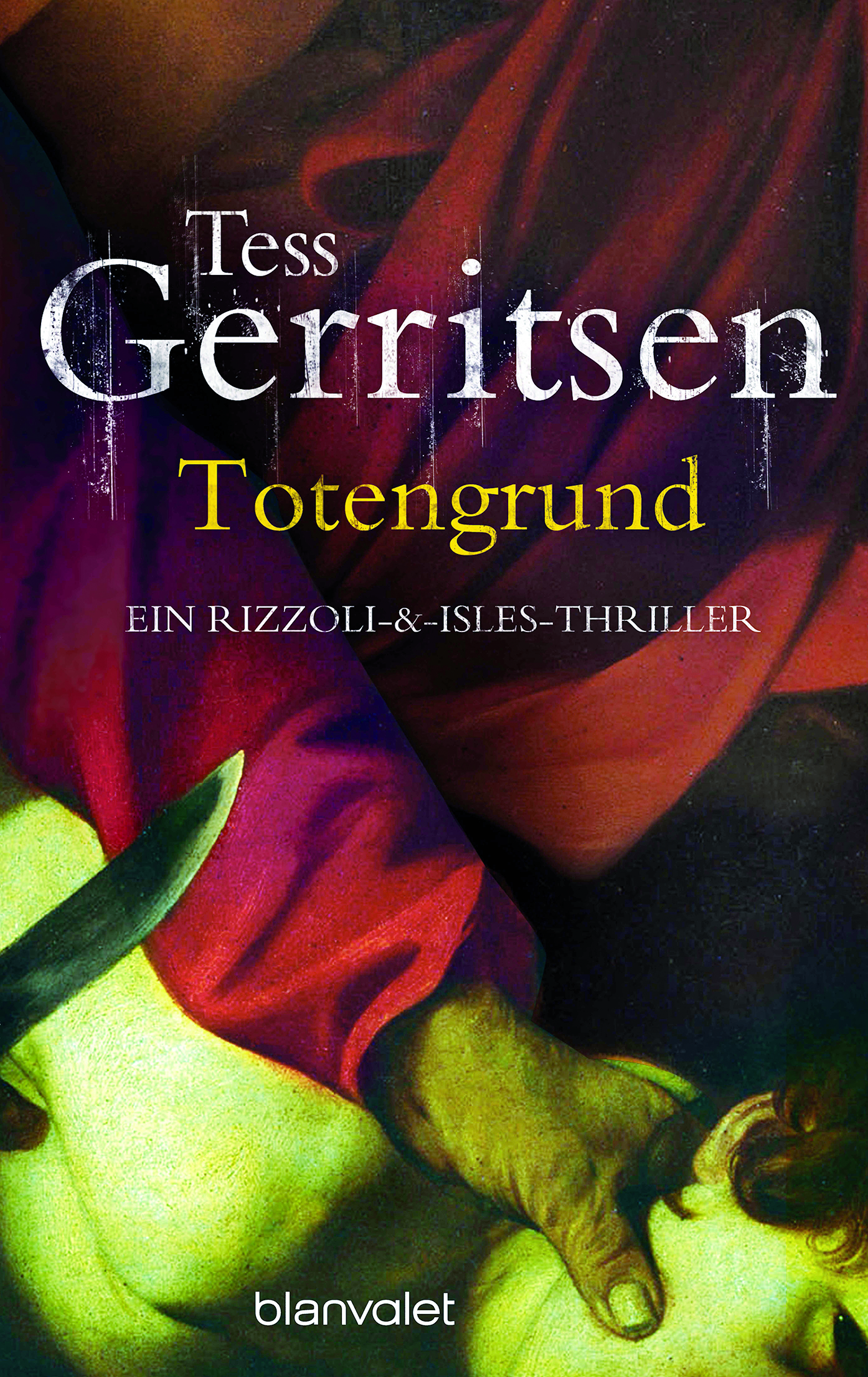 Tess Gerritsen: Totengrund. Blanvalet, München 2012. DNB; Ausschnitt aus Caravaggios Die Opferung Isaaks (1603)